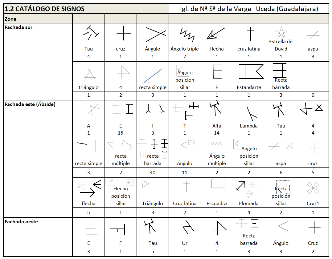 Iglesia de Santa María de la Varga, Uceda (Guadalajara), Castilla-La Mancha, España, románica transición, s. XII-XIII. Catálogo de signos lapidarios.